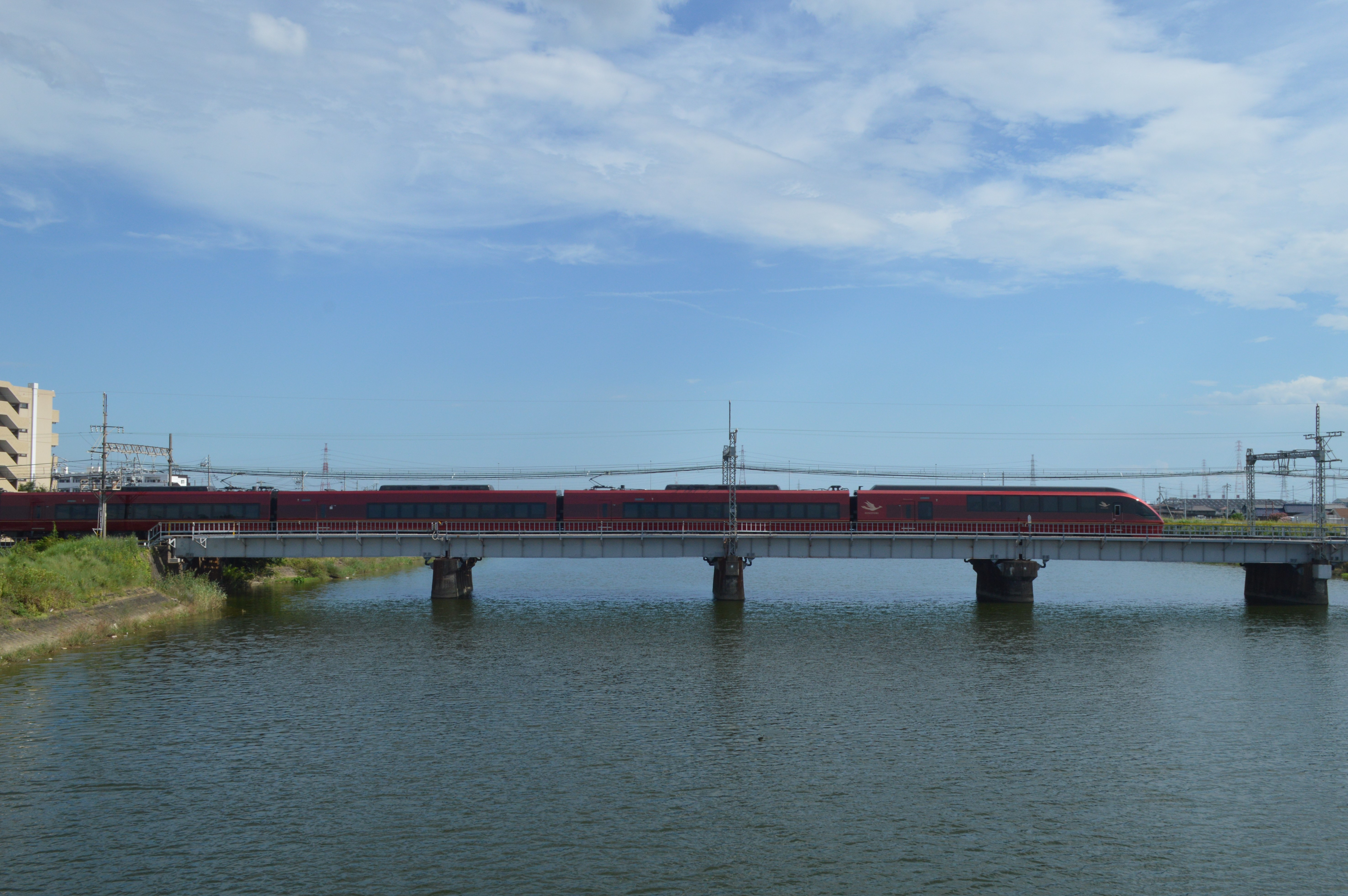 愛知県海部郡蟹江町を流れる日光川と近鉄名古屋線。